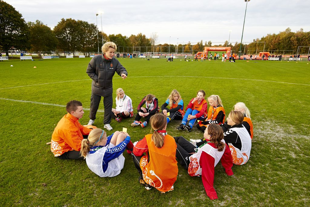 Hilversum, 26 oktober 2012 Voor meiden die altijd al eens langs de lijn hebben willen staan bij een wedstrijd van het Nederlands Elftal, was vrijdag 26 oktober een belangrijke dag. Op het terrein van Sportclub 't Gooi vond namelijk de ING Ballenmeiden Selectiedag plaats. Ruim 200 kinderen - alleen meiden - namen deel aan deze selectiedag, die onder leiding stond van ex-international Rob Witschge, aanvoerster van het Nederlands vrouwenelftal Daphne Koster en Roger Reijners, de bondscoach van het Nederlands vrouwenelftal. Uiteindelijk werden er 14 meisjes geselecteerd. Zij zullen op 14 november a.s. langs de lijn staan bij de oefeninterland van het Nederlands Elftal tegen Duitsland in De Arena in Amsterdam. De selectiedag werd georganiseerd door de ING, hoofdsponsor van Oranje.